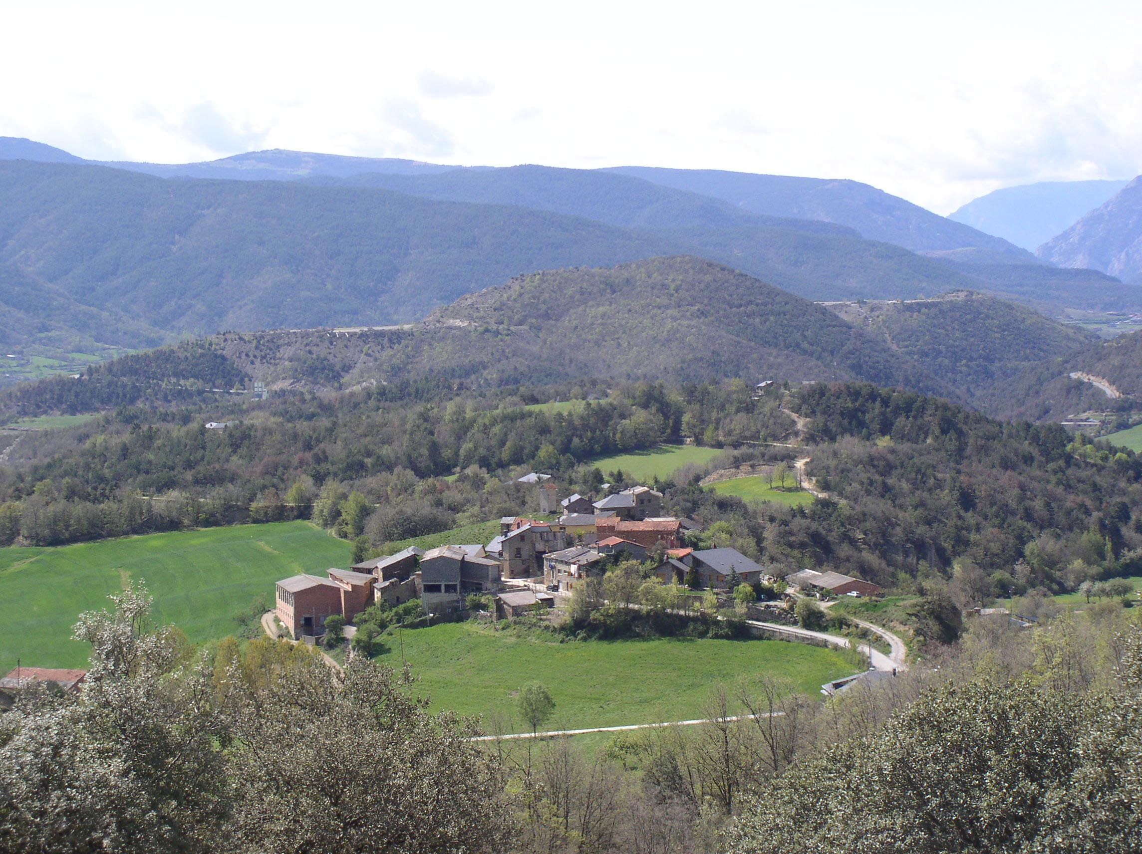 Bellestar, Catalonia, Spain